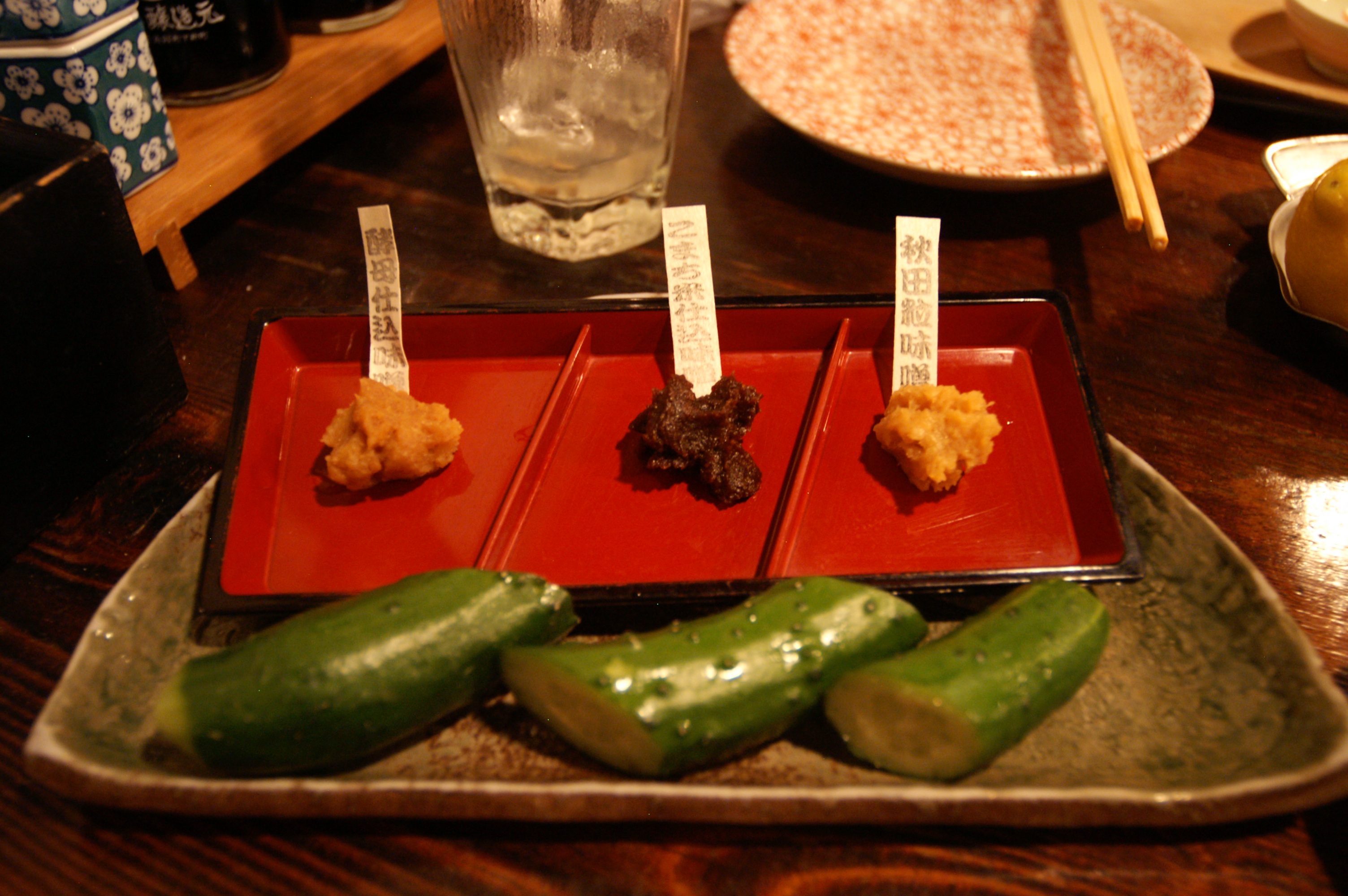 秋田川反漁屋酒場。 (2008/01/13 Akita, JAPAN)